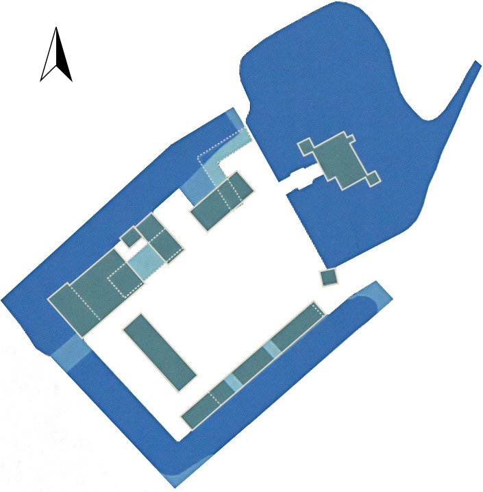 Schematischer Lageplan des Hauses Bodelschwingh in Dortmund; gestrichete Gebäudeteile und hellblaue Grabenflächen sind heute nicht mehr vorhanden.